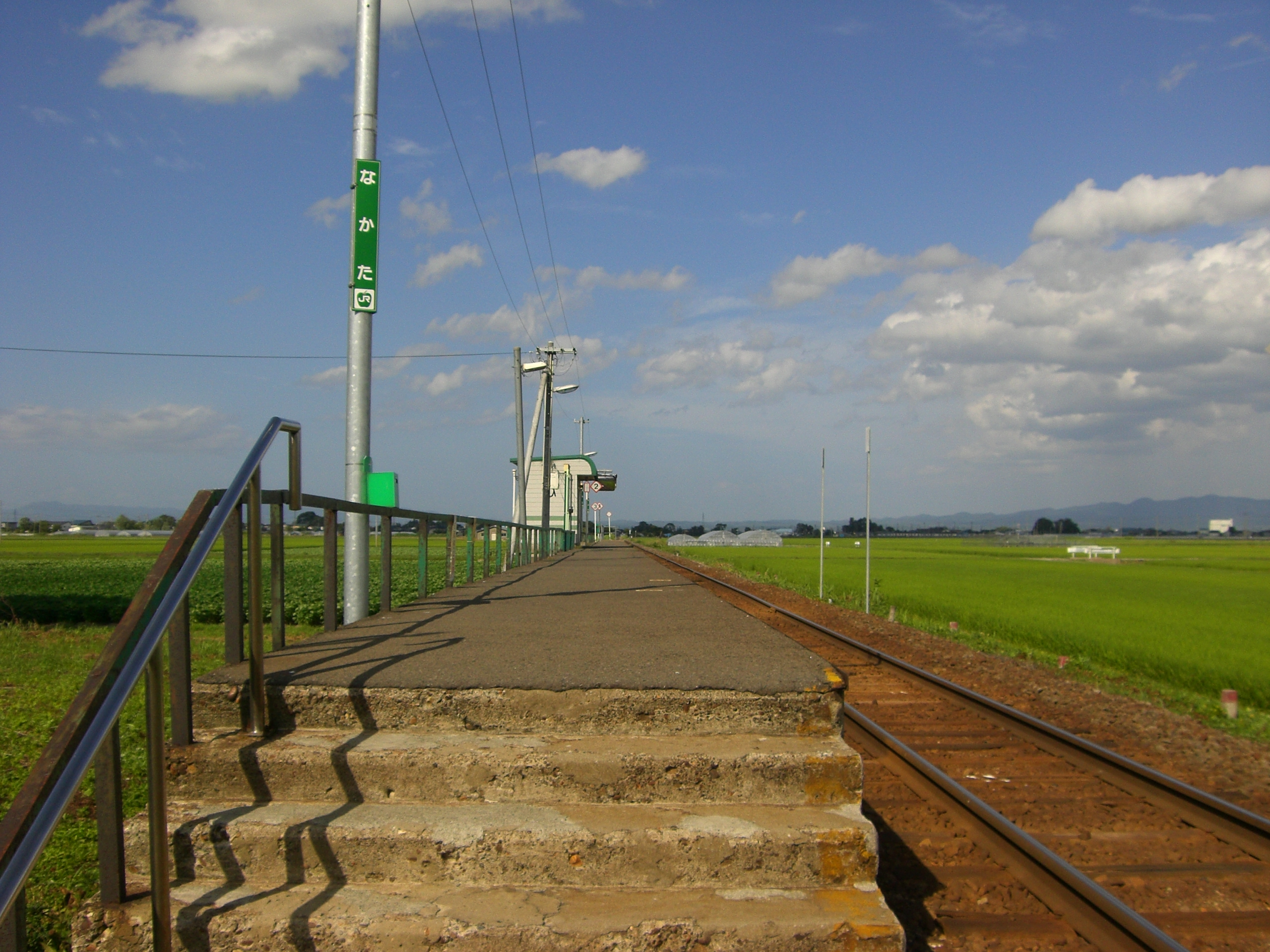 NAKATA STATION 中田駅 ホーム、待合室